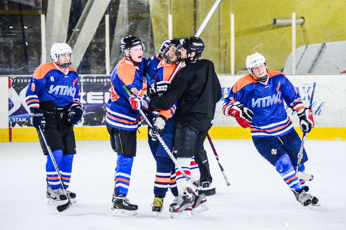 Хоккейная команда Университета ИТМО